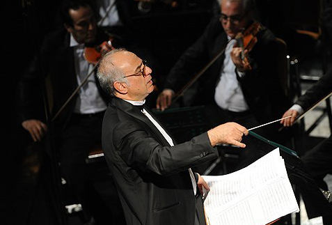 ۱۳۹۰/۸/۲۳ - نادر مرتضی پور در حال رهبری ارکستر سمفونیک تهران